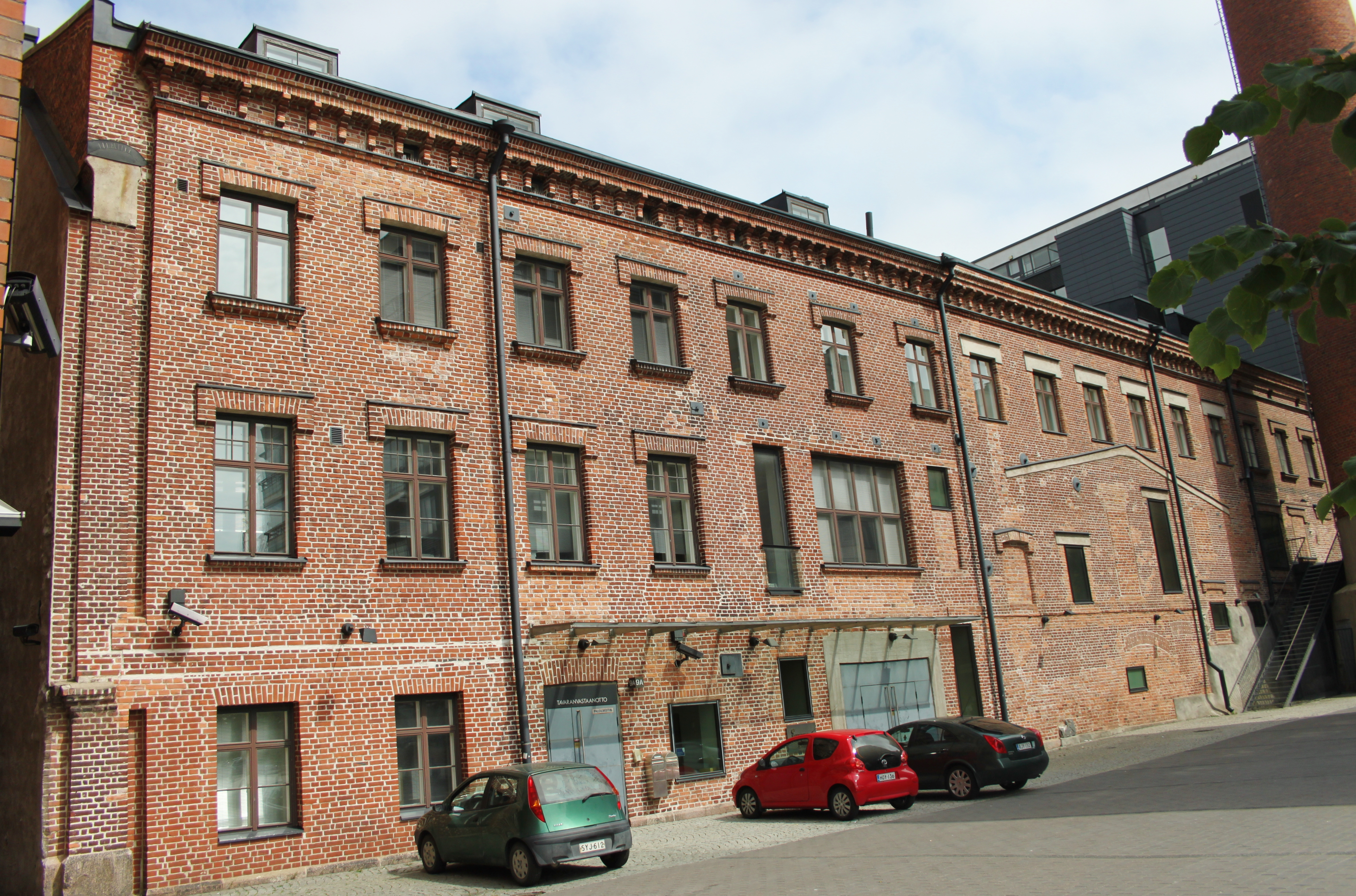 Vuonna 1832 rakennettu Sinebrychoffin vanha tehdasrakennus, Hietalahdenranta 9a